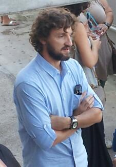 L'ex-jugador merengot Mista.